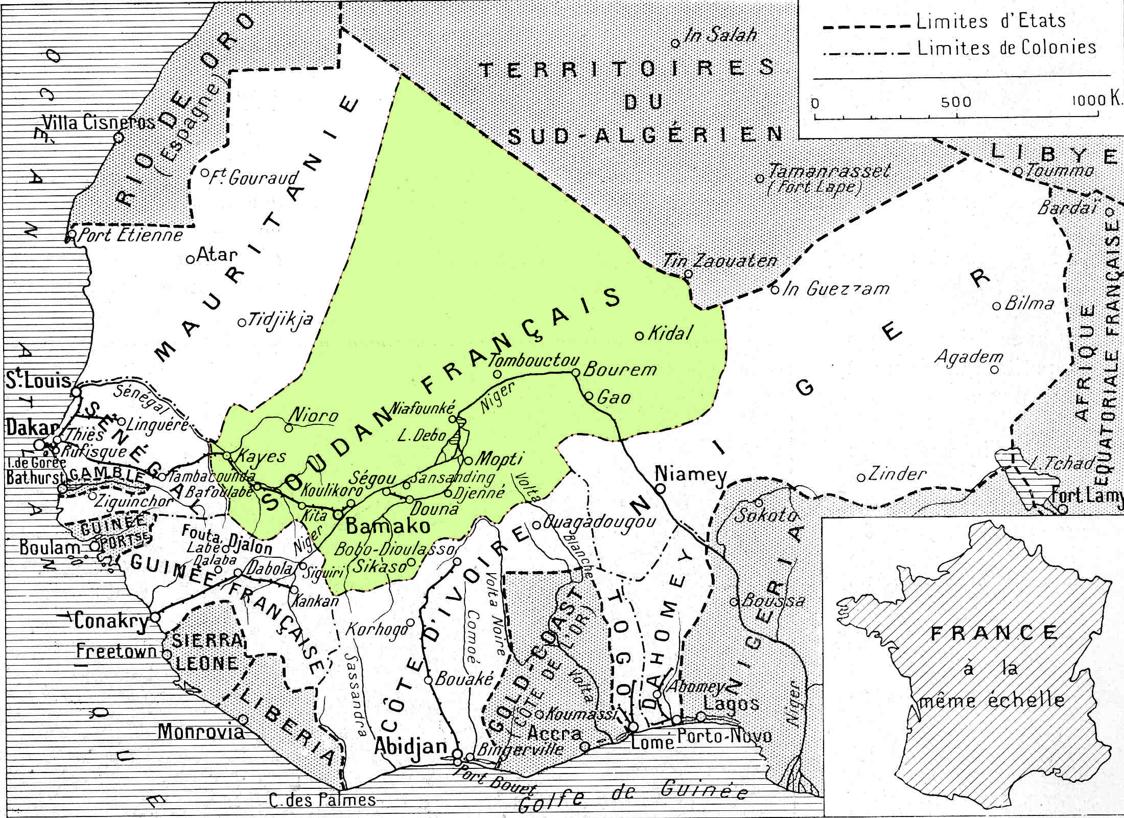 Carte de l'AOF ("Les sept colonies qui composent l'Afrique occidentale française" in L'oeuvre de la France en Afrique occidentale, numéro spécial de L'Illustration, 29 février 1936, p. 261)